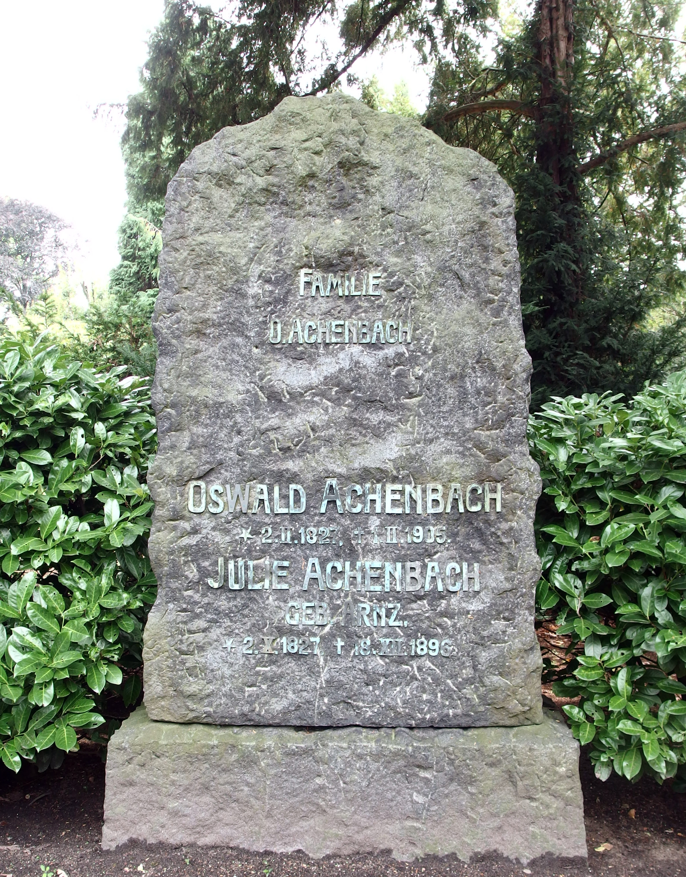 Grabstein Oswald und Julie Achenbach, Nordfriedhof Düsseldorf: Der Vertreter der Düsseldorfer Malerschule gehörte zu den bedeutendsten Landschaftsmalern Europas.